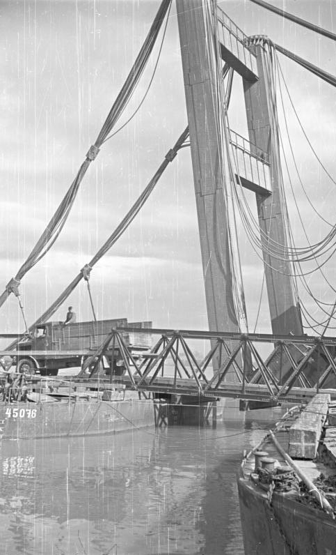 Gesprengte Donaubrücke [Sovabrücke]